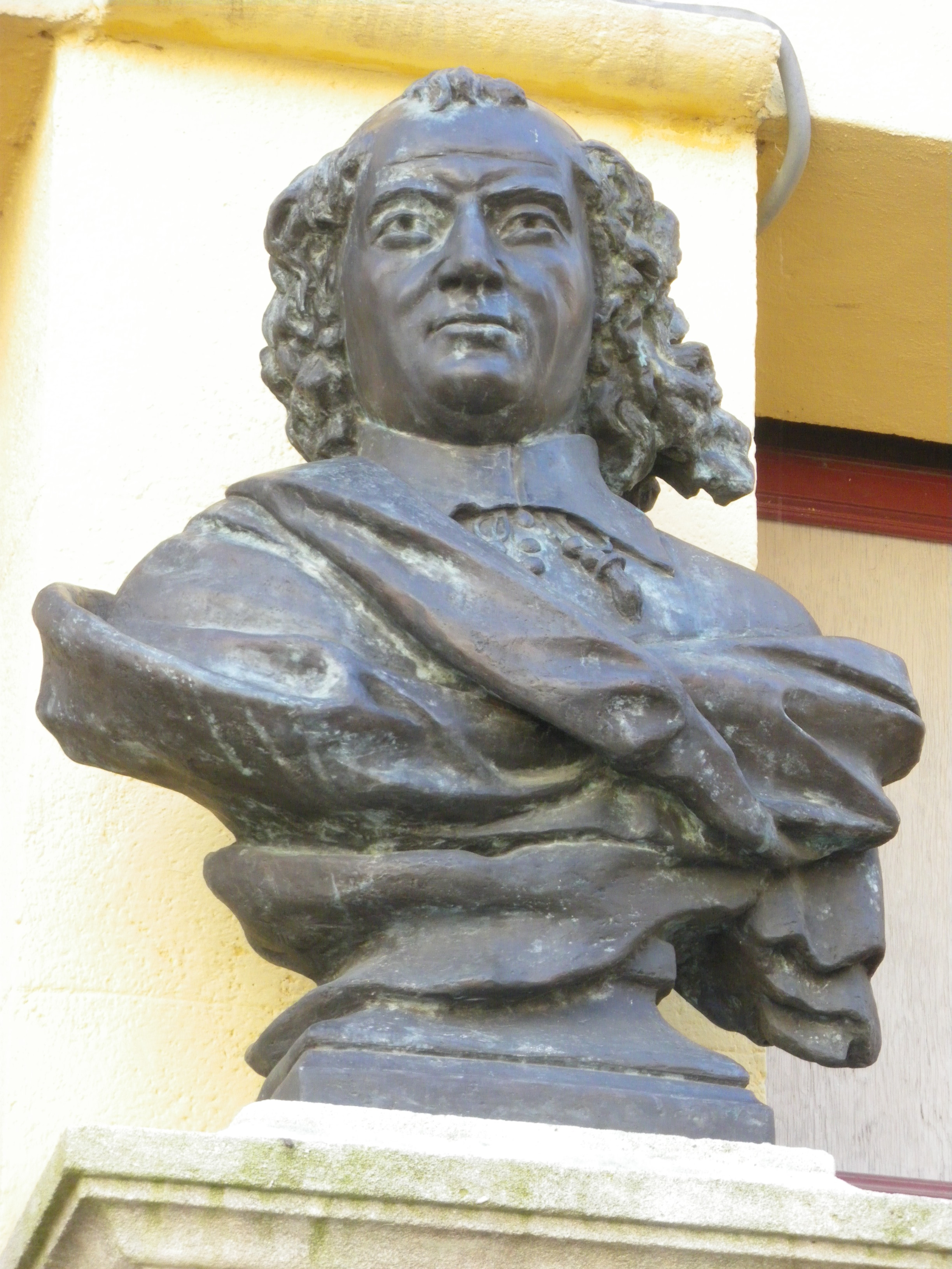 M Saboly, Félibrige Montilien